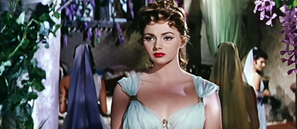 Scena del film Le fatiche di Ercole (1958)